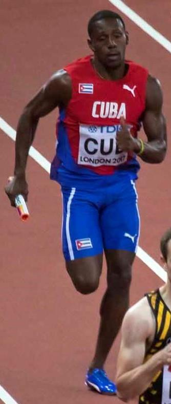 d9_14 finale 4x400m team belgium